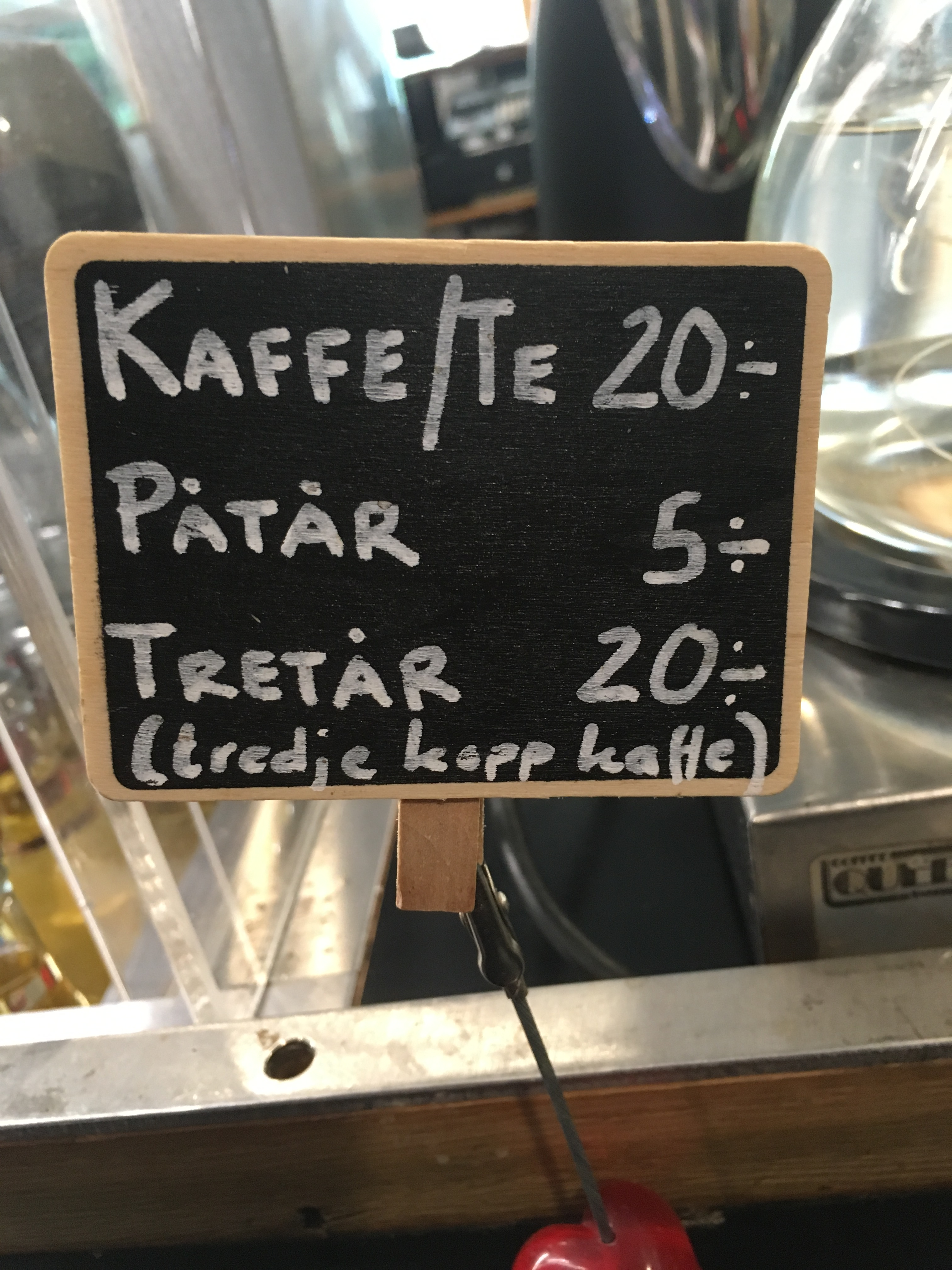 Skylt med termerna påtår och tretår, med den sistnämnda definierad p g a dess ovanlighet.